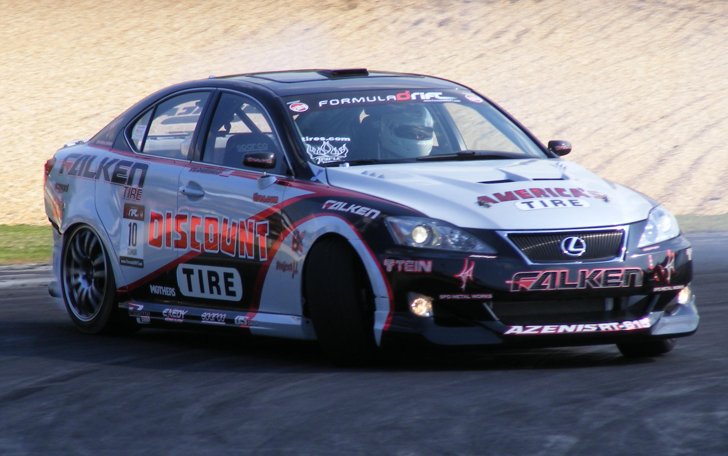 Lexus IS drifting